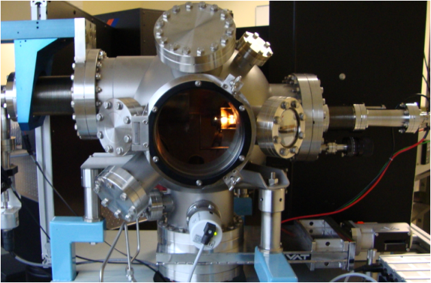 appareillage